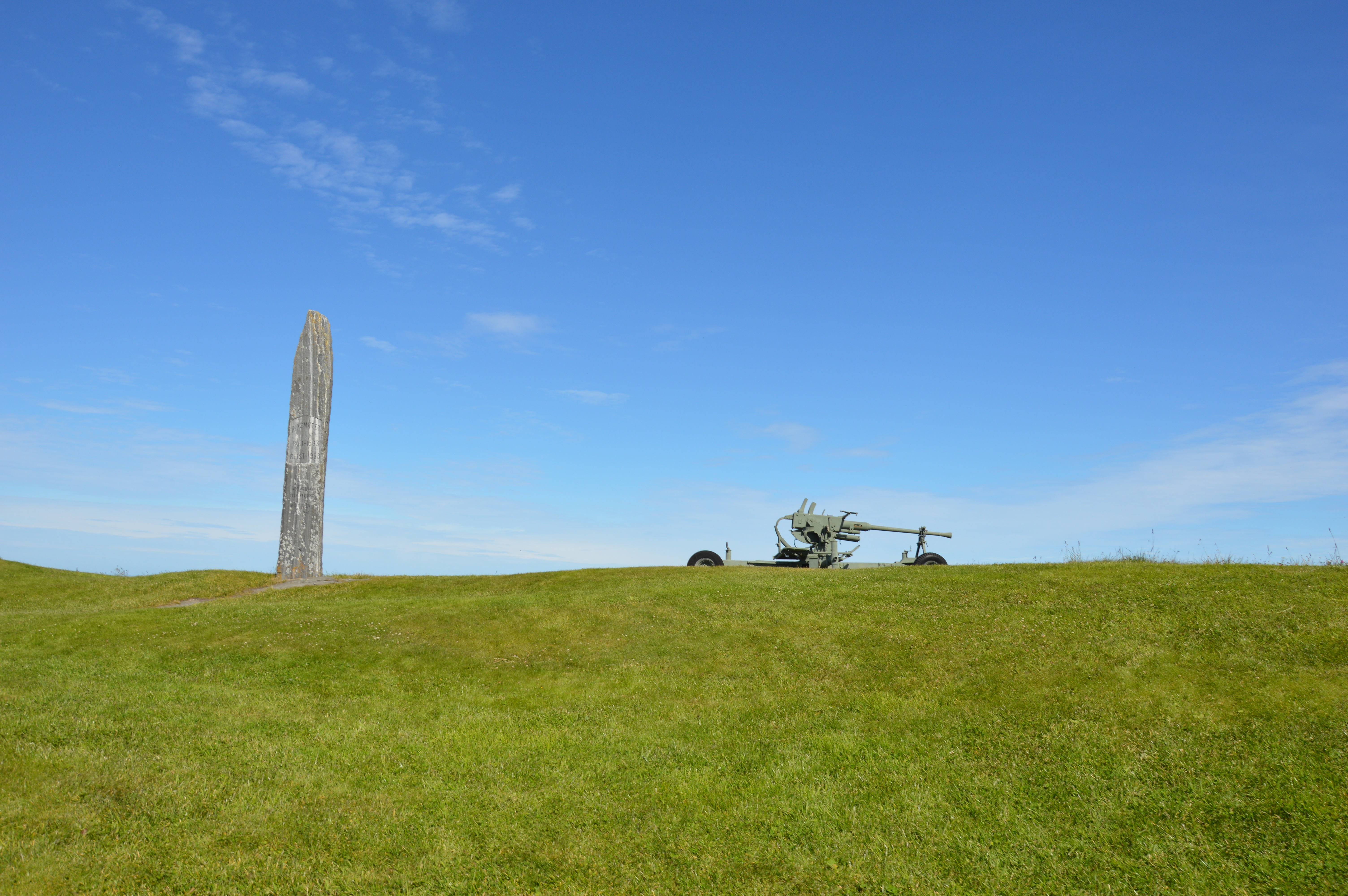 Bautastein von Bud